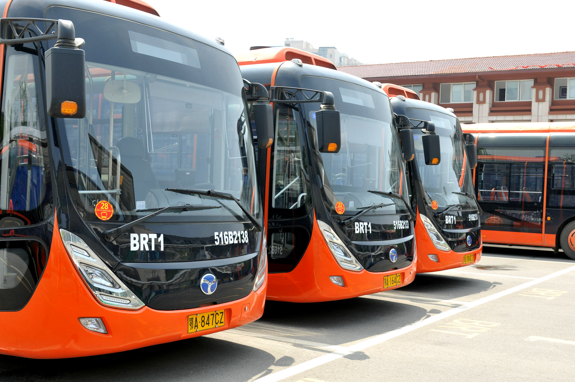 武汉公交BRT1车辆停在武昌站东广场场站